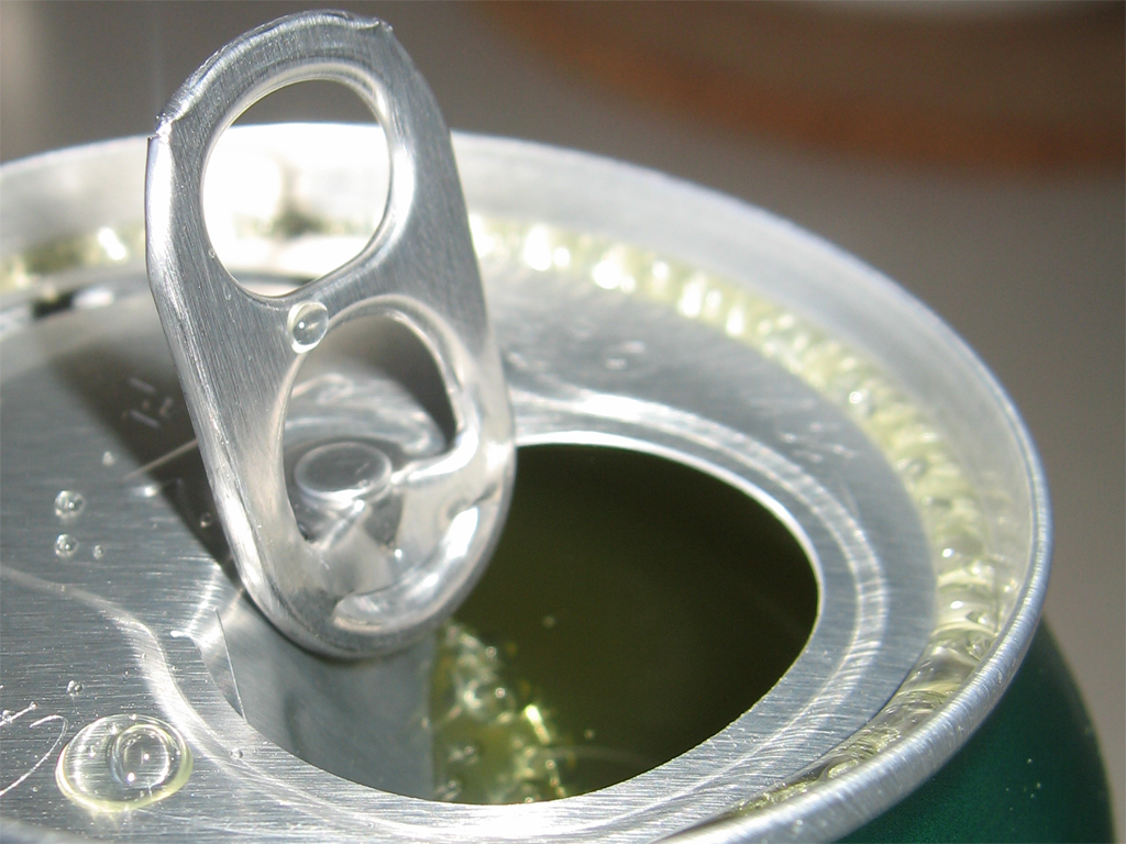 12 Oz. Mountain Dew aluminum can top detail.